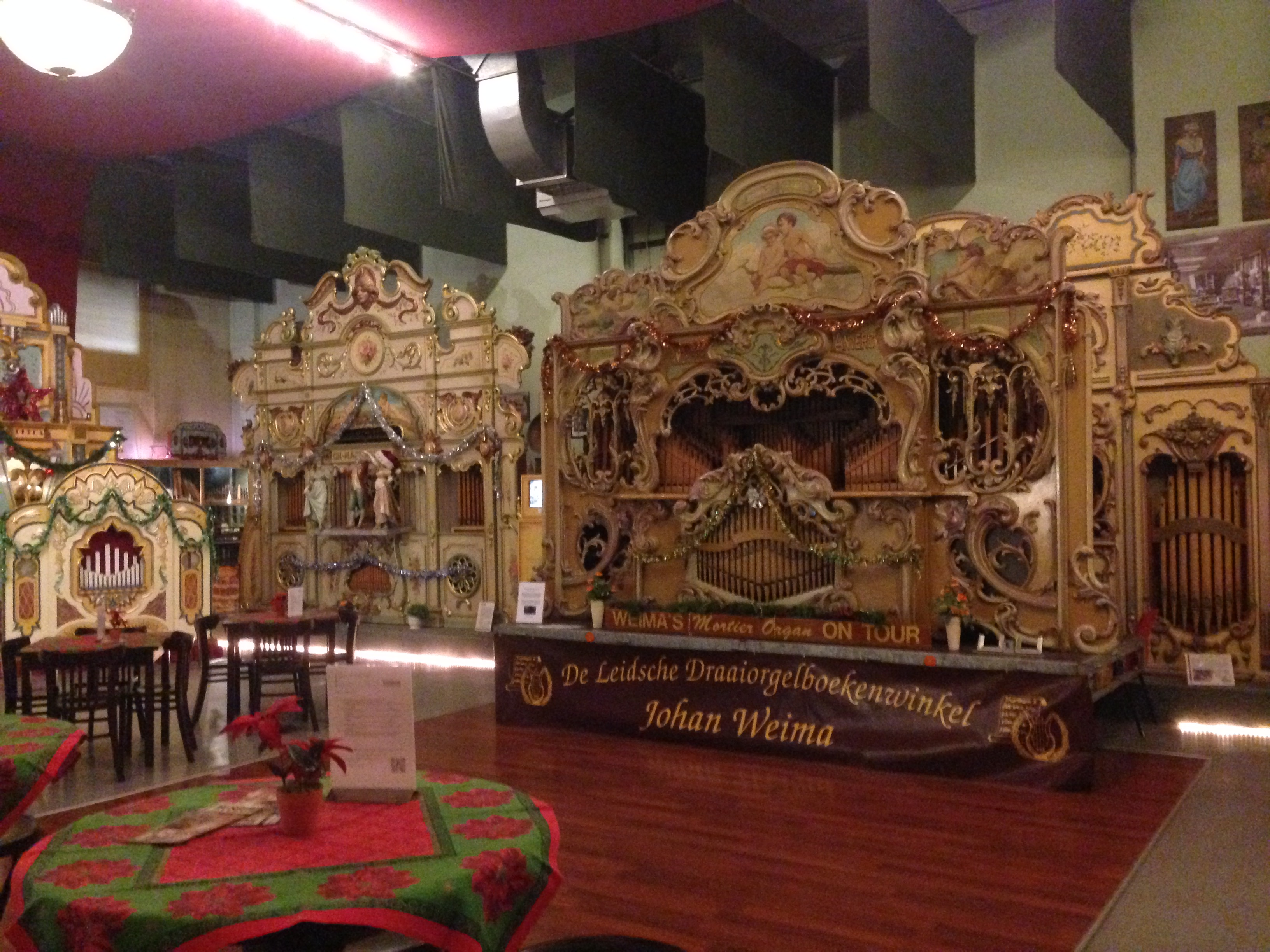 Draaiorgelmuseum, Haarlem, Netherlands